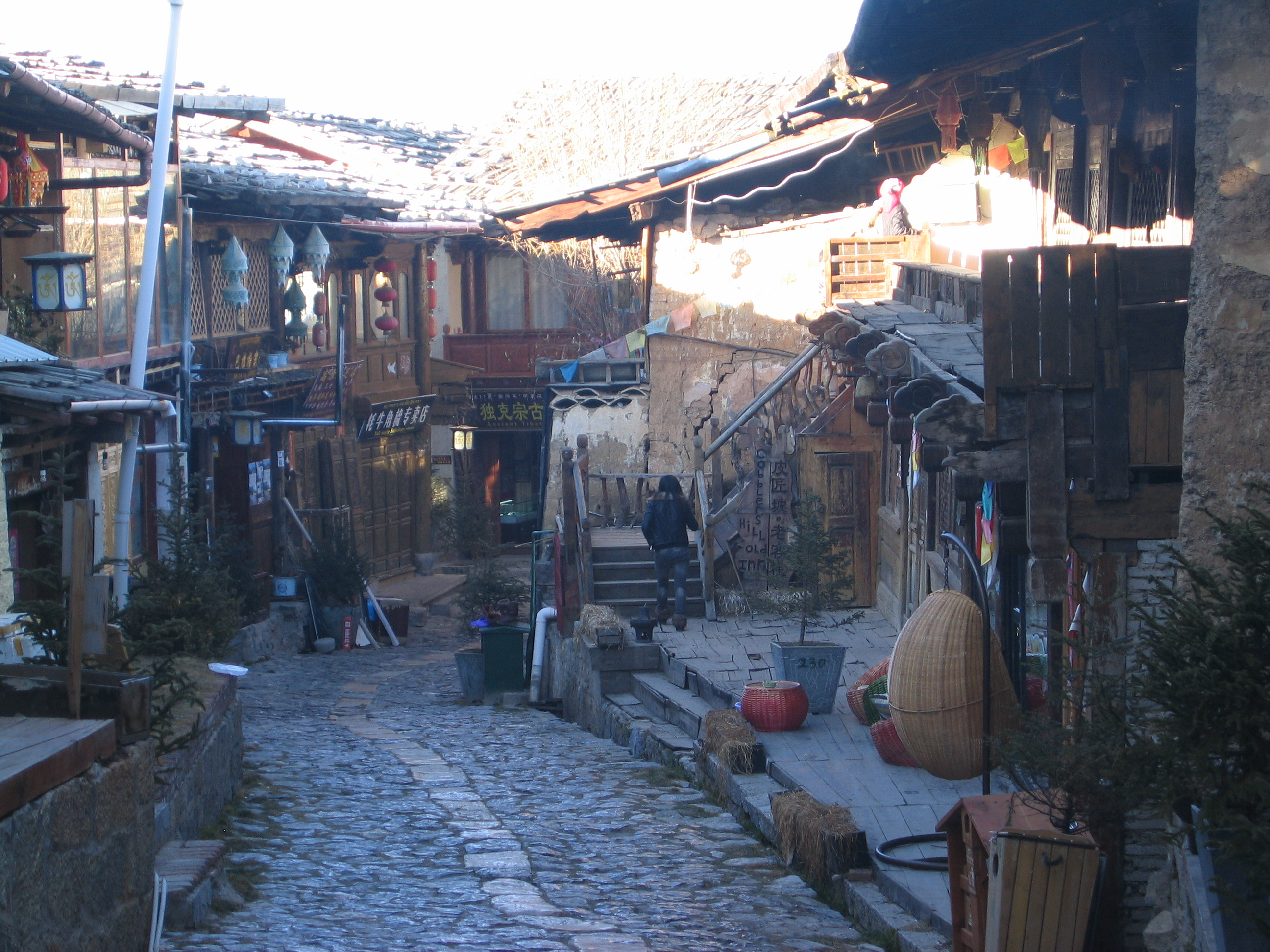 Zhongdian, 中甸县 Zhōngdiàn Xiàn, Shangri-La